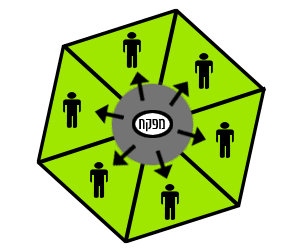 תרשים כללי של he:פנופטיקון, מבנה הטרוטופי (פוקו)